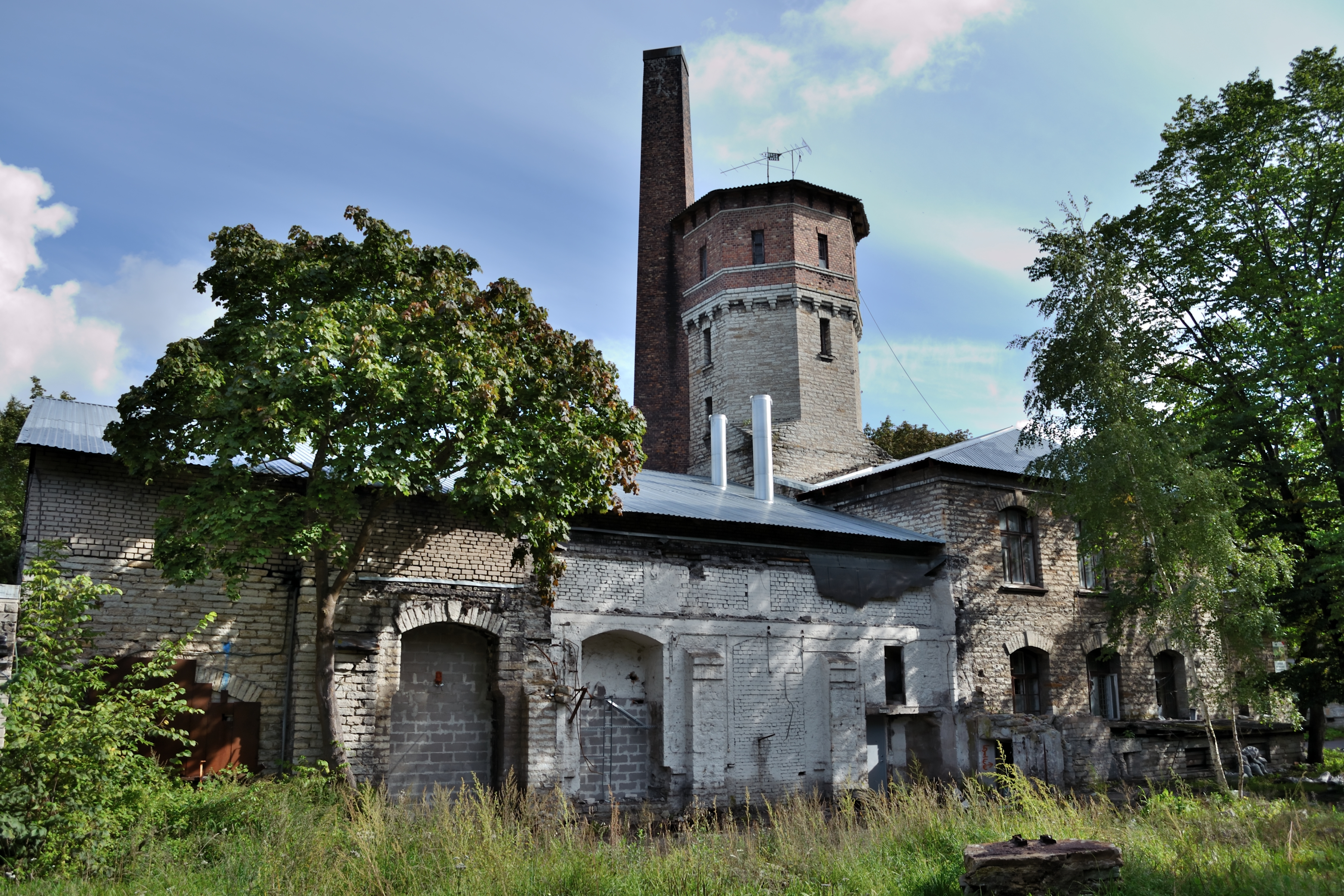 Tallinn, Seewaldi vaimuhaigla katlamaja-elektrijaam Paldiski mnt 52-13, 1903